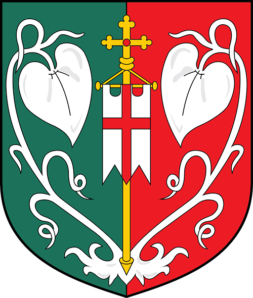 znak, Pěčín, okres Rychnov nad Kněžnou